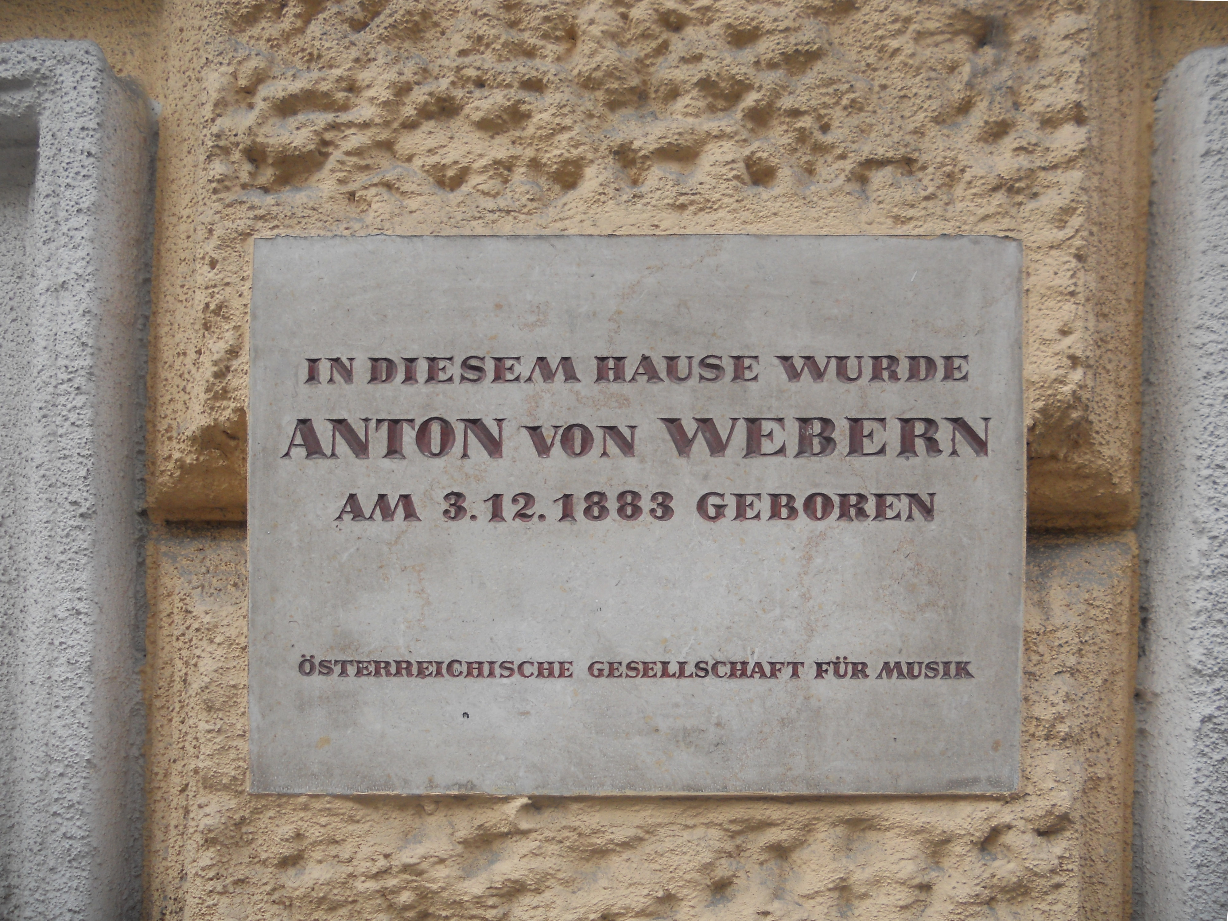 Gedenktafel für Anton von Webern auf dem Haus Löwengasse 53 in Wien